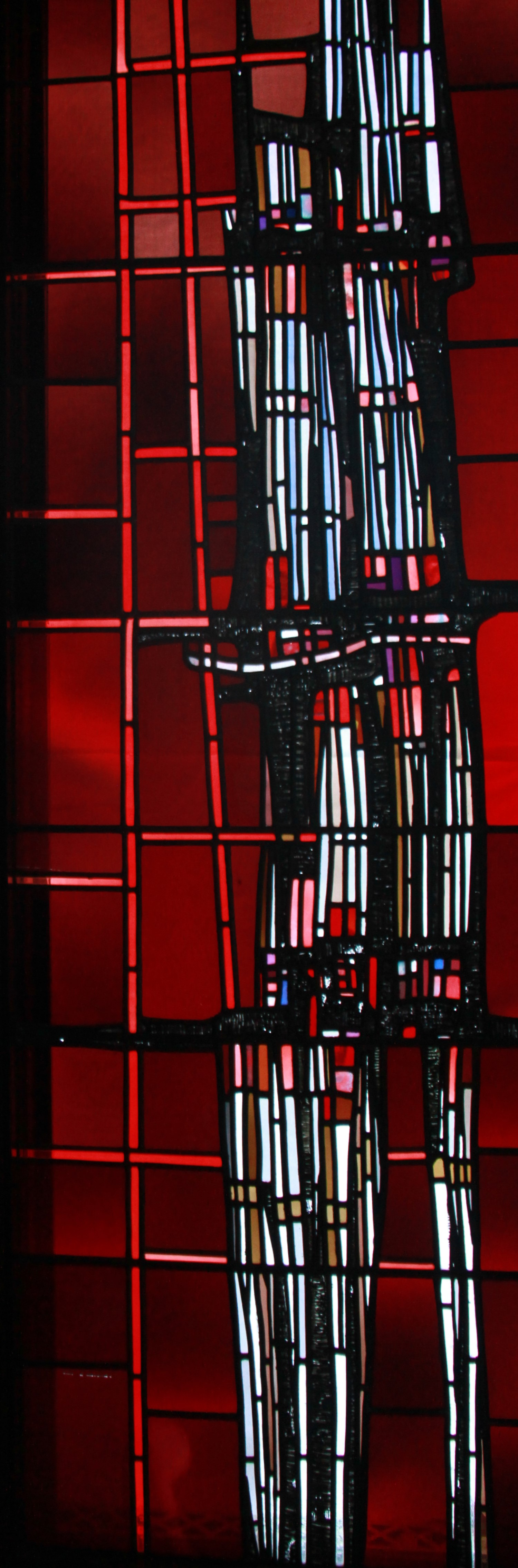 Glasraam